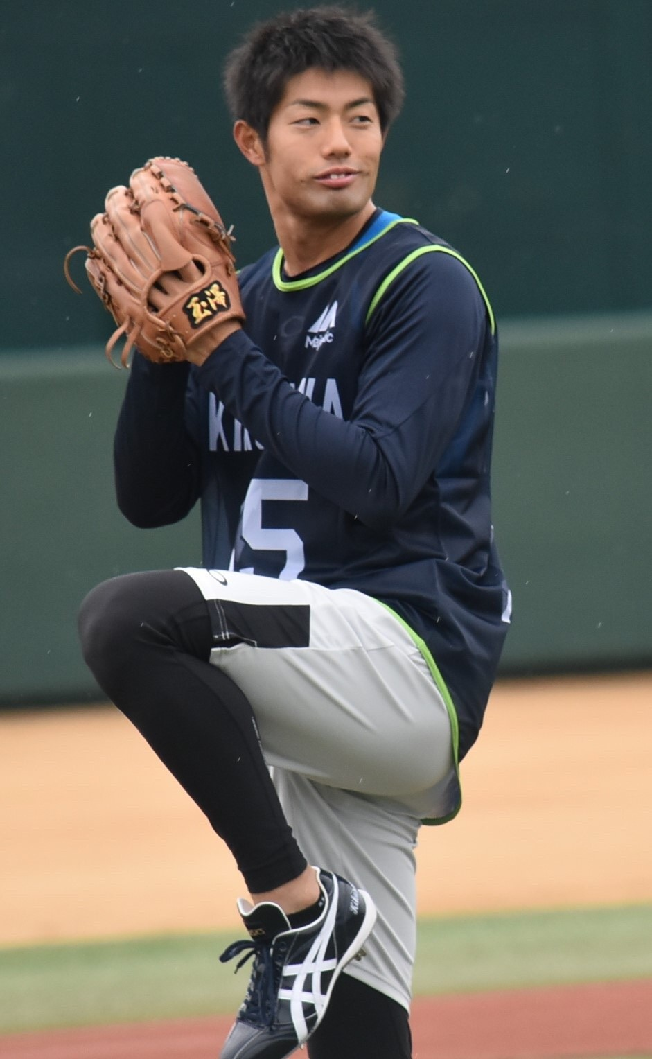 2017年1月9日、ヤクルト戸田球場にて